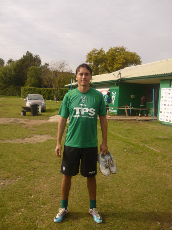 Fotografía de Adán Vergara, jugador chileno de fútbol que juega como defensa en el Santiago Wanderers.